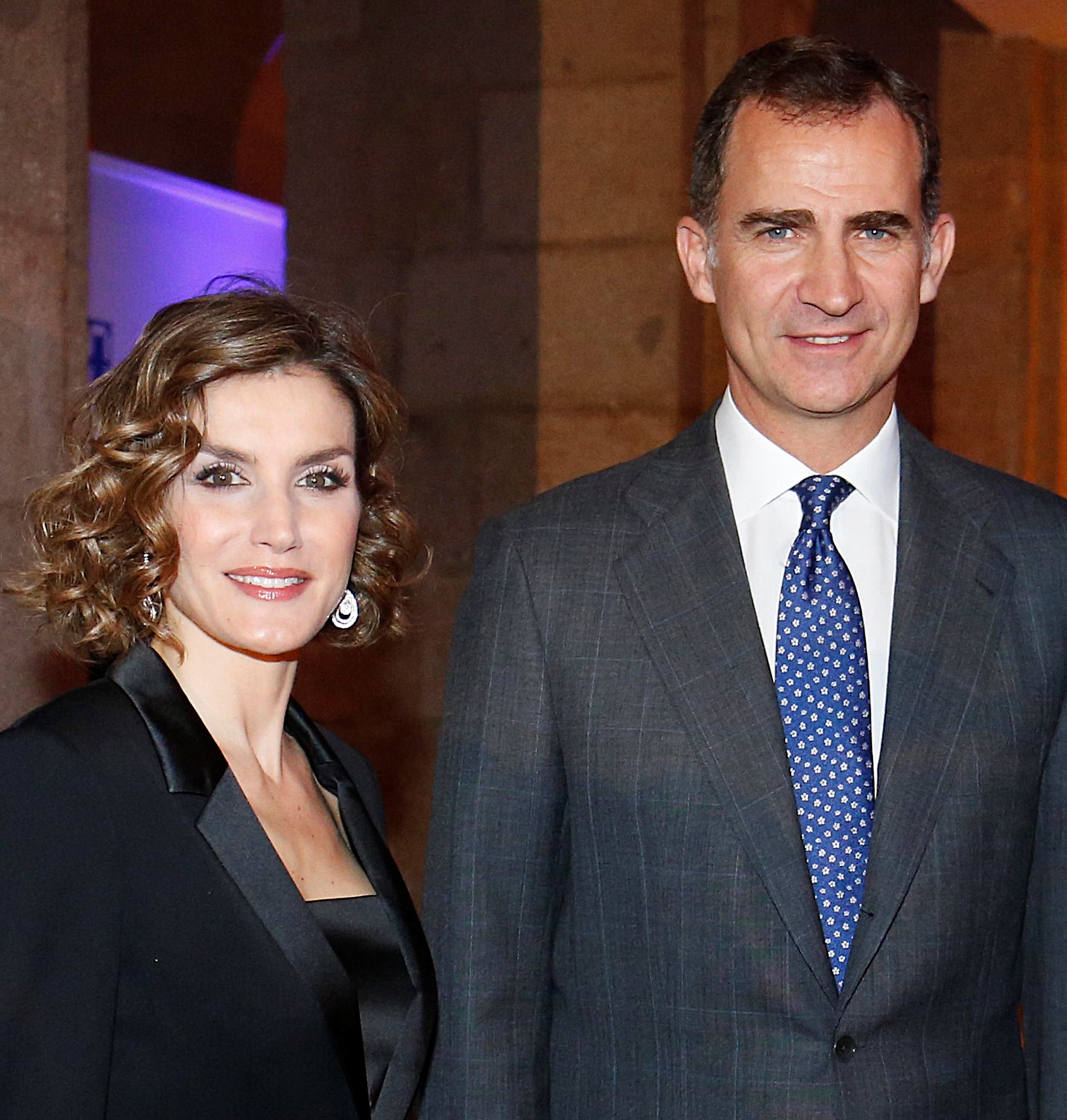 Sus Majestades los Reyes de España, en el XV aniversario de 20 minutos el 24 de noviembre de 2015.